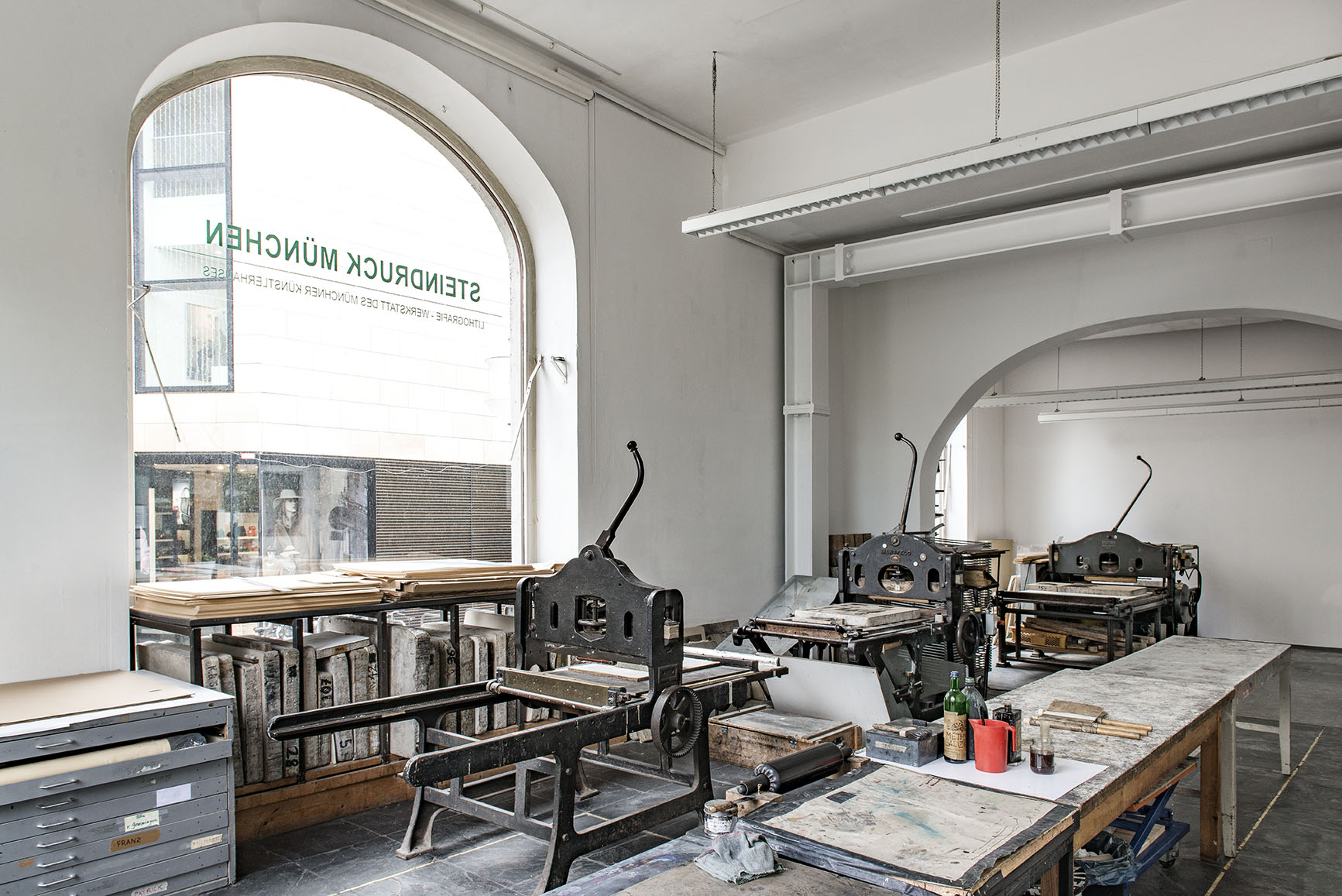 Lithografiewerkstatt des Münchner Künstlerhauses, Foto: Rainer Spitzenberger